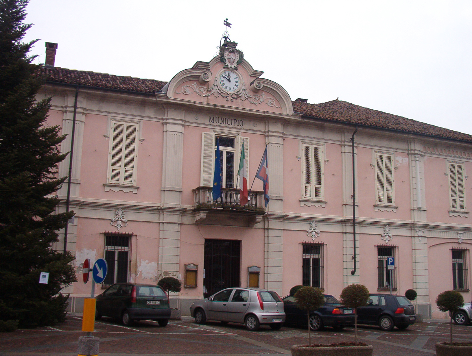 Palazzo del Municipio - Pancalieri - Provincia di Torino - Italy